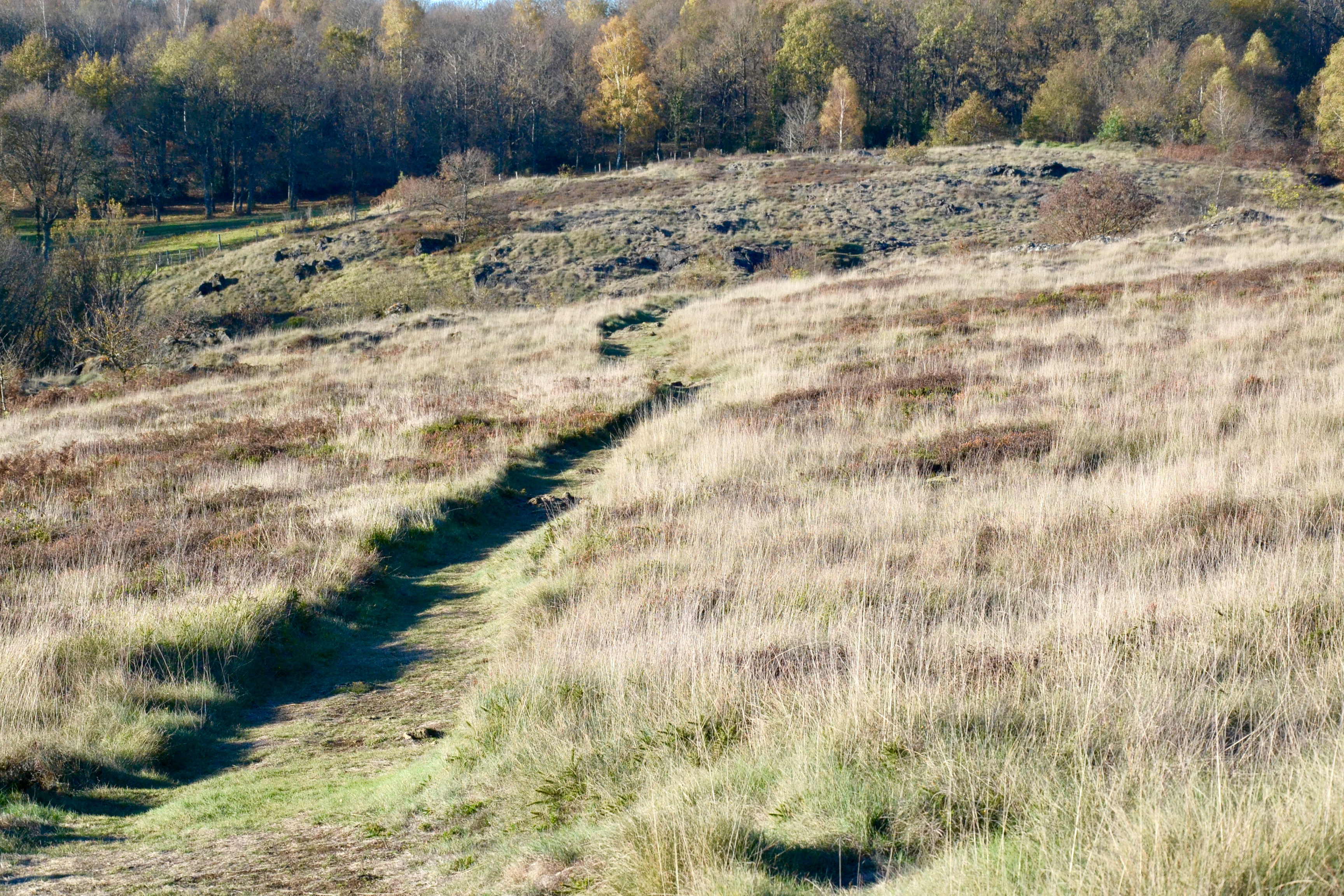 Paysage de la lande de Saint-Laurent (La Roche-l'Abeille, Haute-Vienne, France)